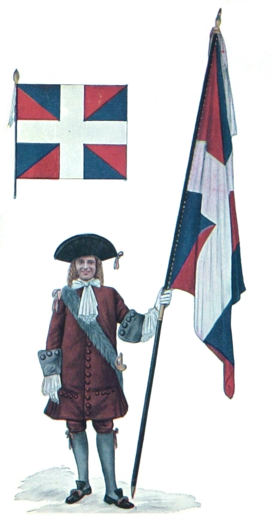 Officier portant les couleurs du régiment de Carignan-Salières, 1665. Cette livrée, particulière au prince de Carignan, est composée de rouge doublé de bleu. L'uniforme régimentaire, de couleur marron, a des parements gris. Gravure éditée à l'occasion du 300e anniversaire de la fondation de Trois-Rivières, en 1934